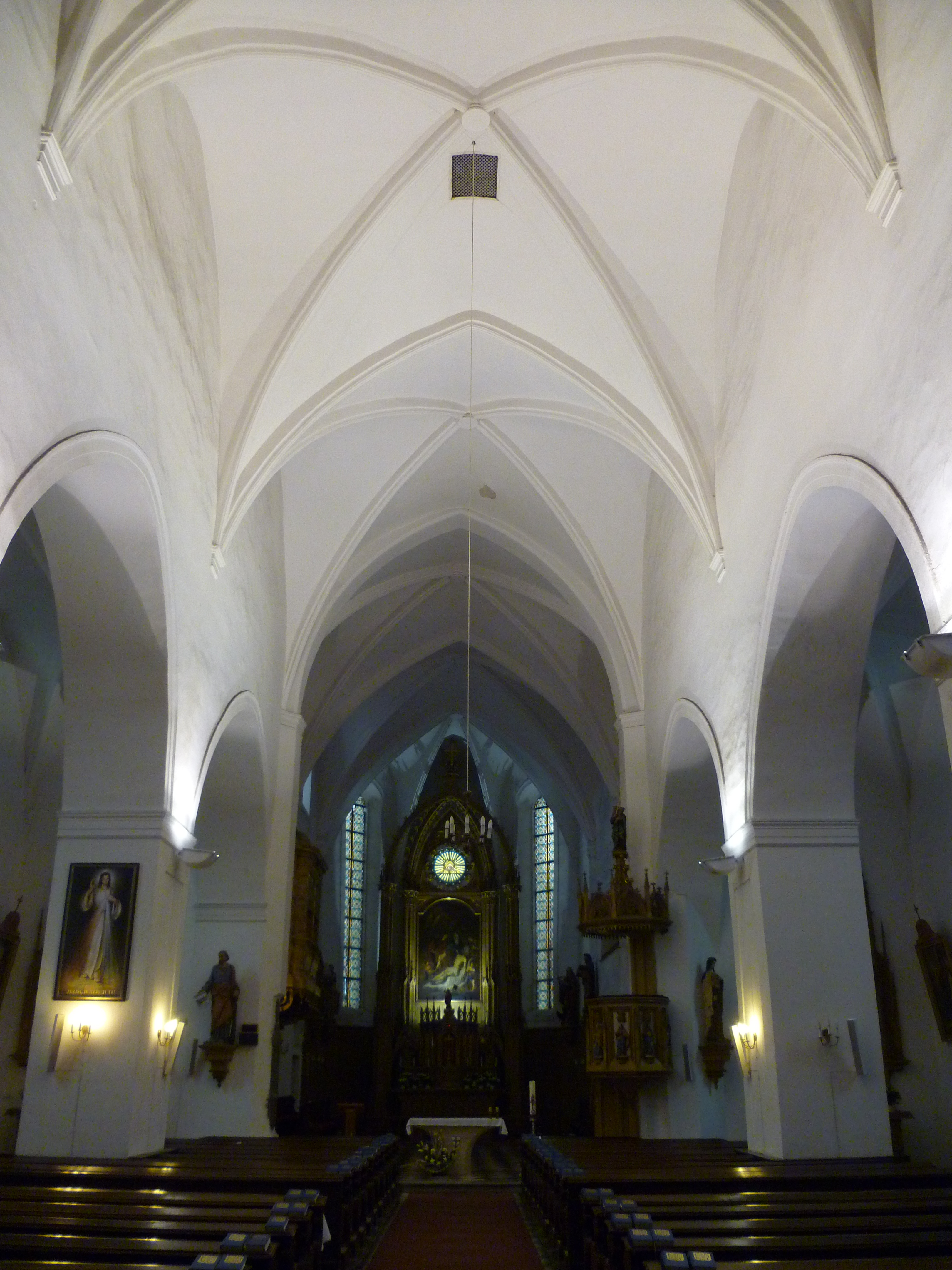 interier